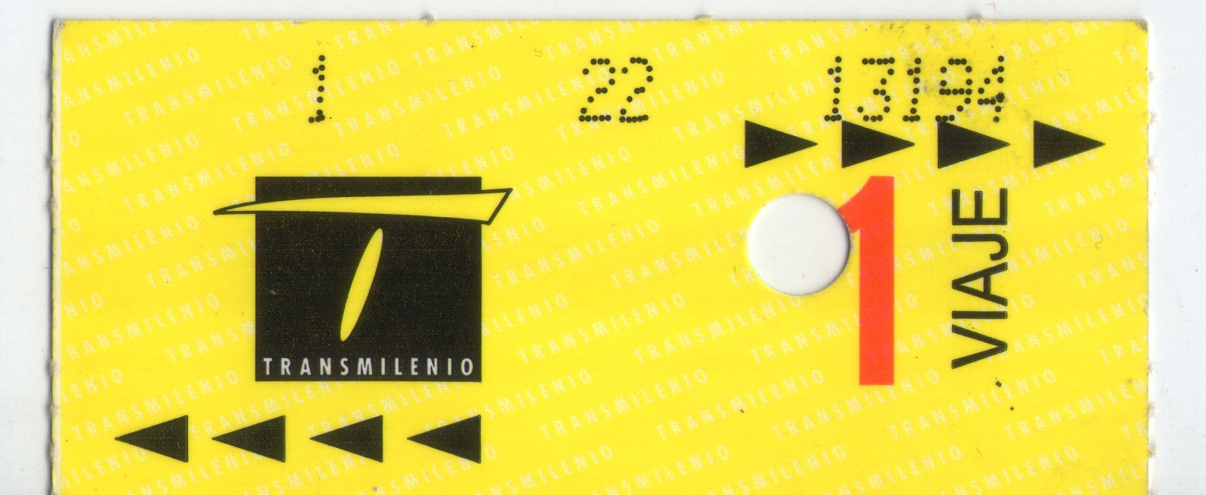 el primer tiquete usado en el sistema de transporte "Transmilenio"